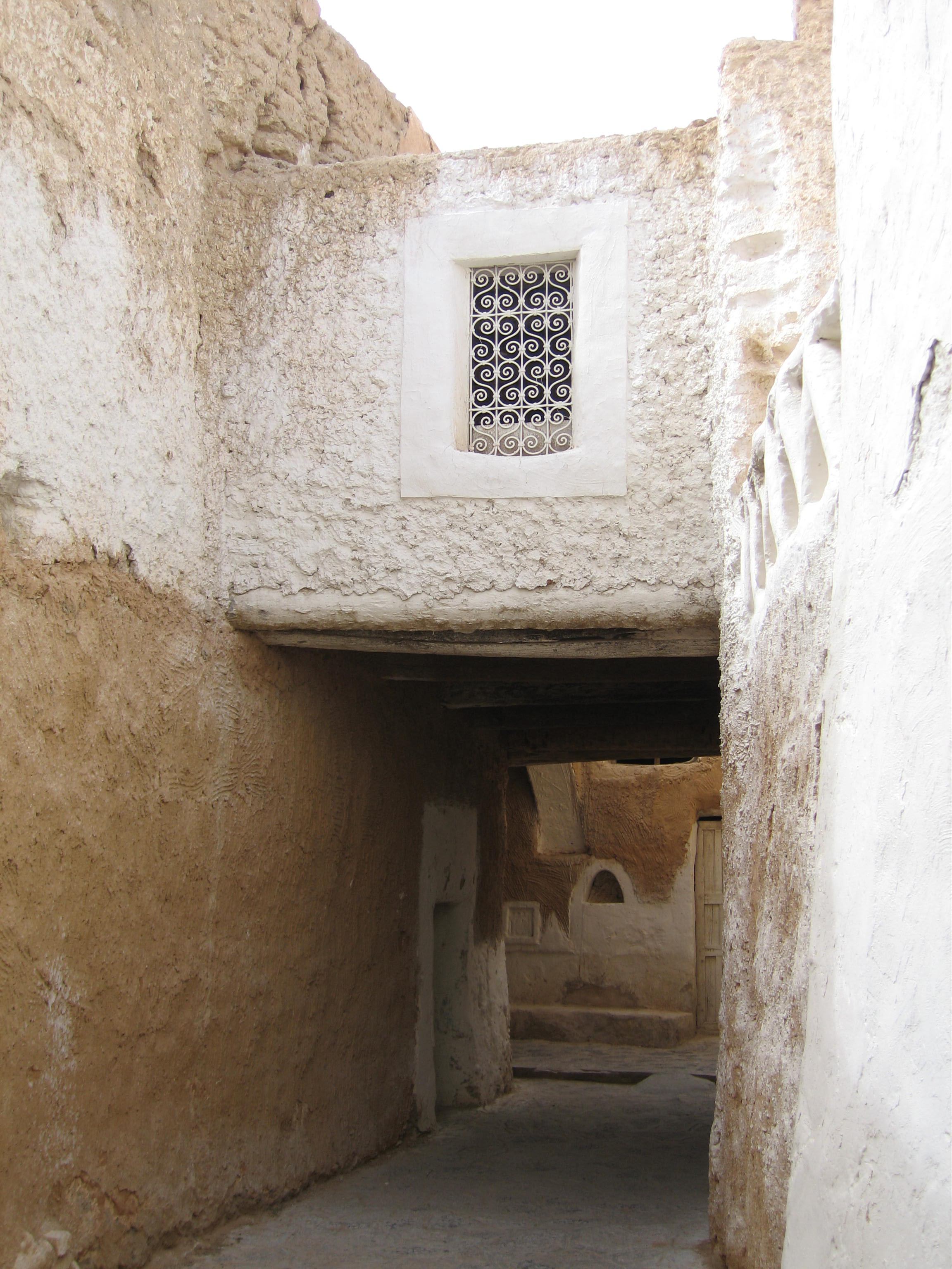 Ciudad vieja de Ghadames, callejón